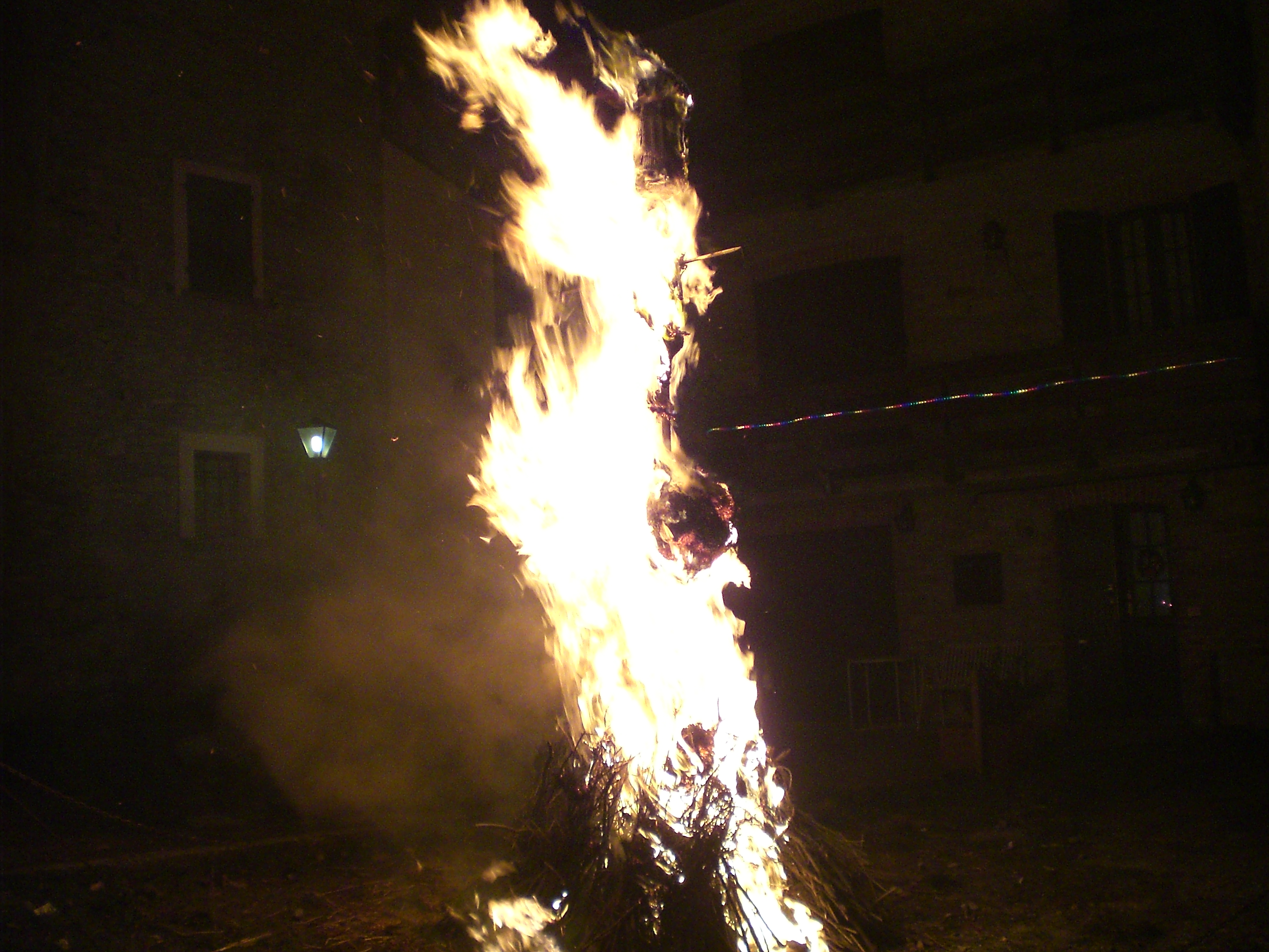 Cicogni, rogo della Vecchia nella notte del 31 dicembre